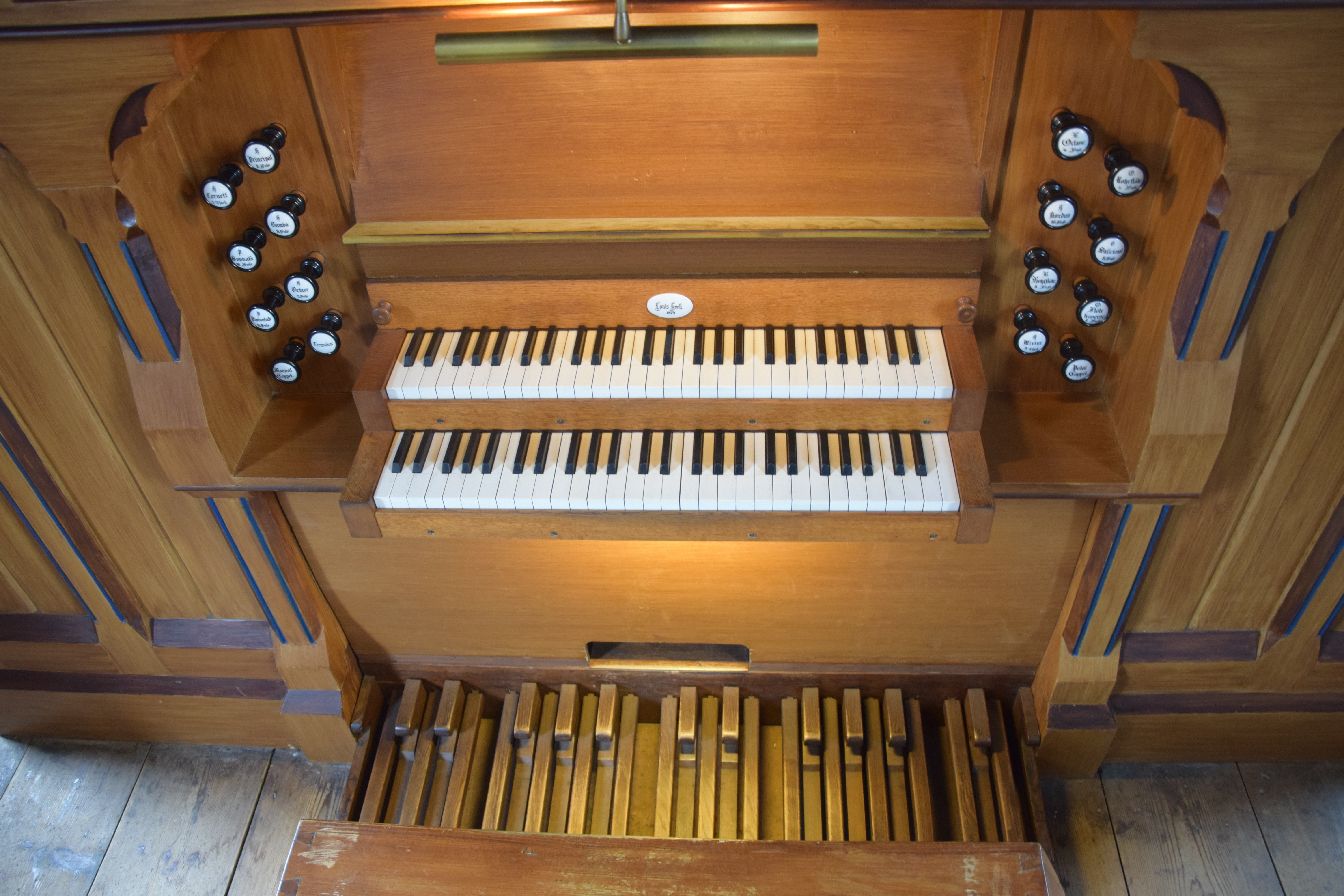 Spieltisch der Krell-Orgel in der Gustav-Adolf-Kirche Gieboldehausen